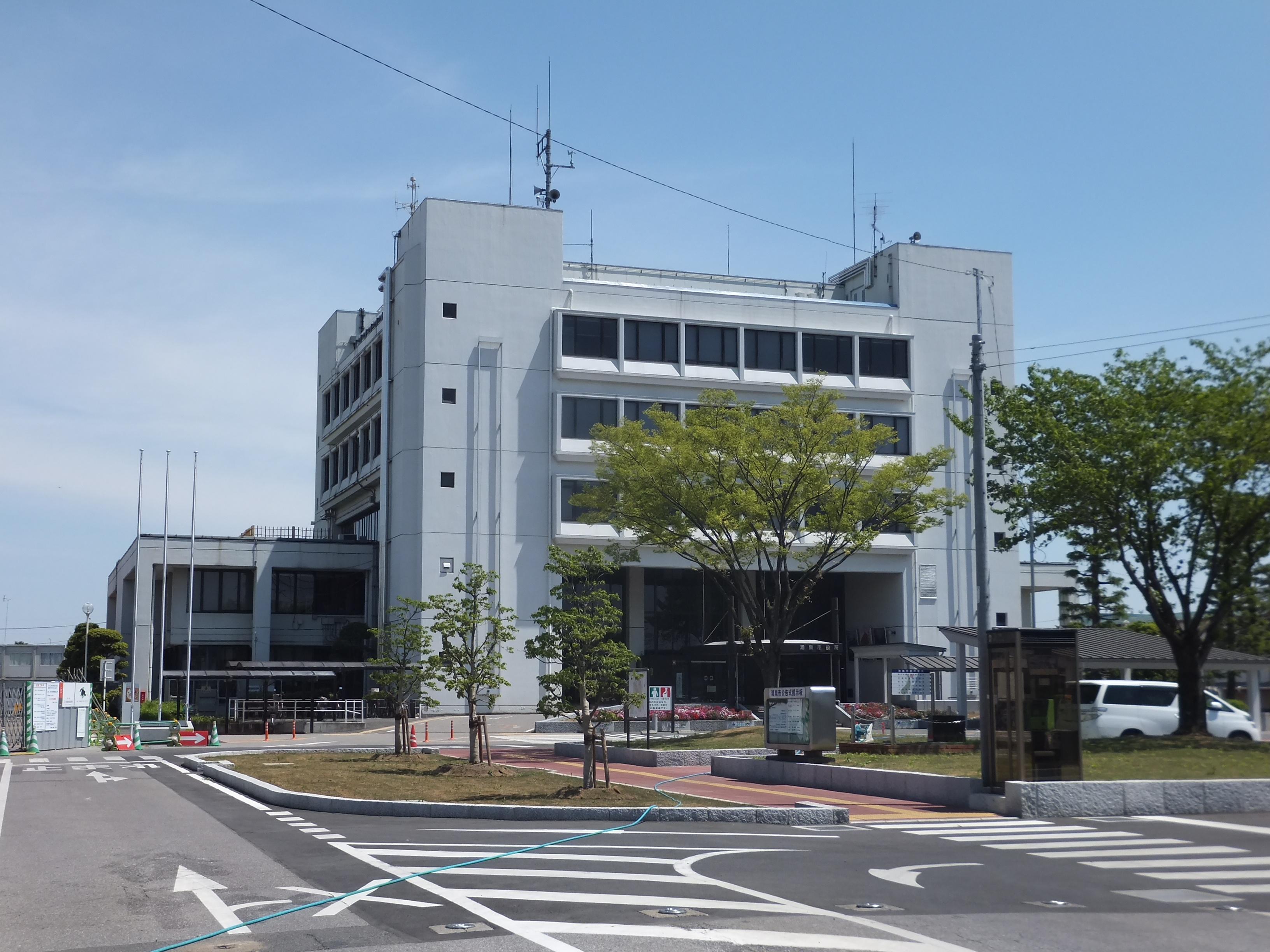 鴻巣市役所本庁舎